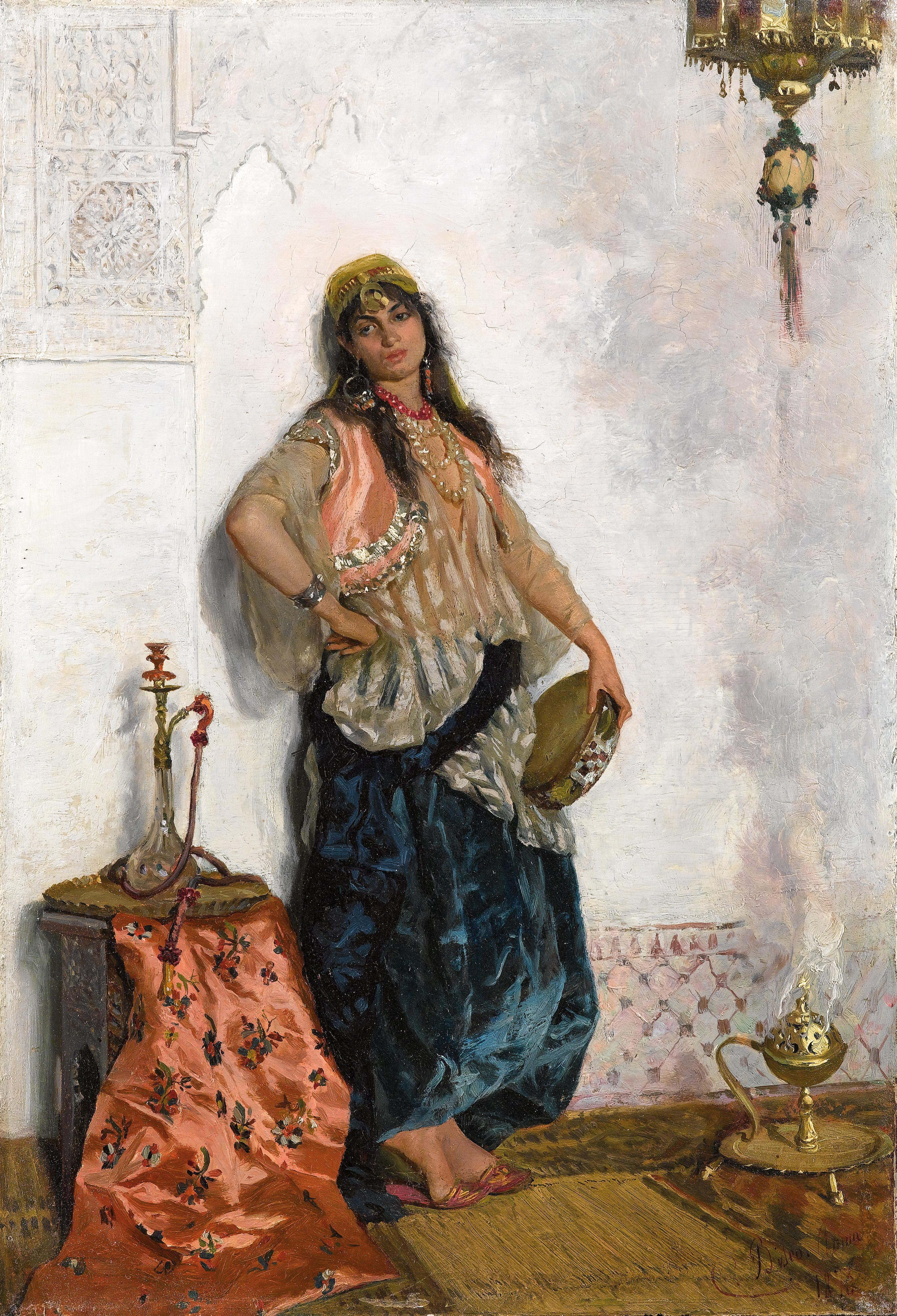 Orientalische Tänzerin, signiert, datiert und bezeichnet C. Biseo Roma 1876, Öl auf Holz, 35 x 25 cm